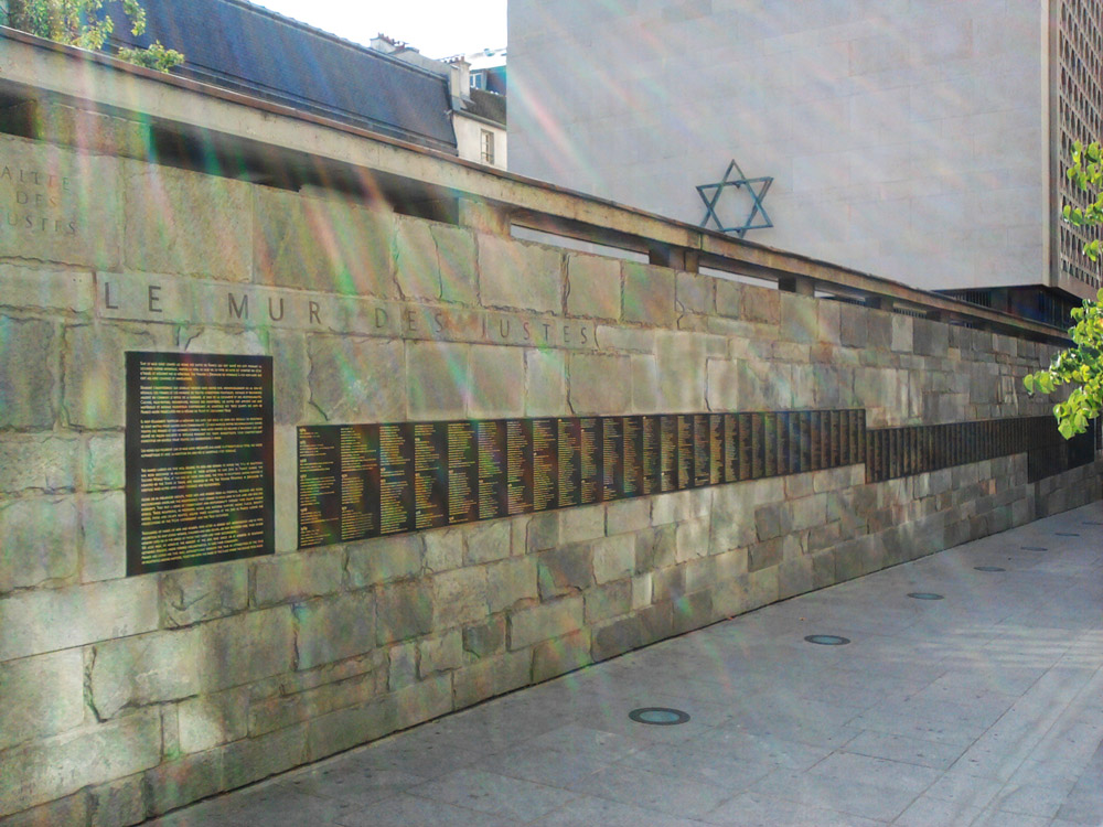 Le mur des Justes, allée des Justes à Paris, avec les noms des Justes parmi les nations français.